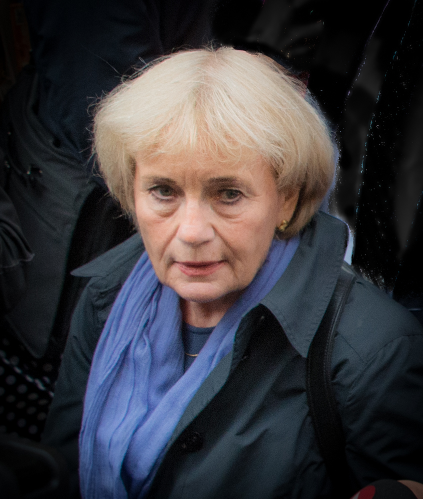 Kerstin Holm på reportageuppdrag för SVT i samband med budgetpromenaden och att höstbudgeten presenteras den 21 september 2015.